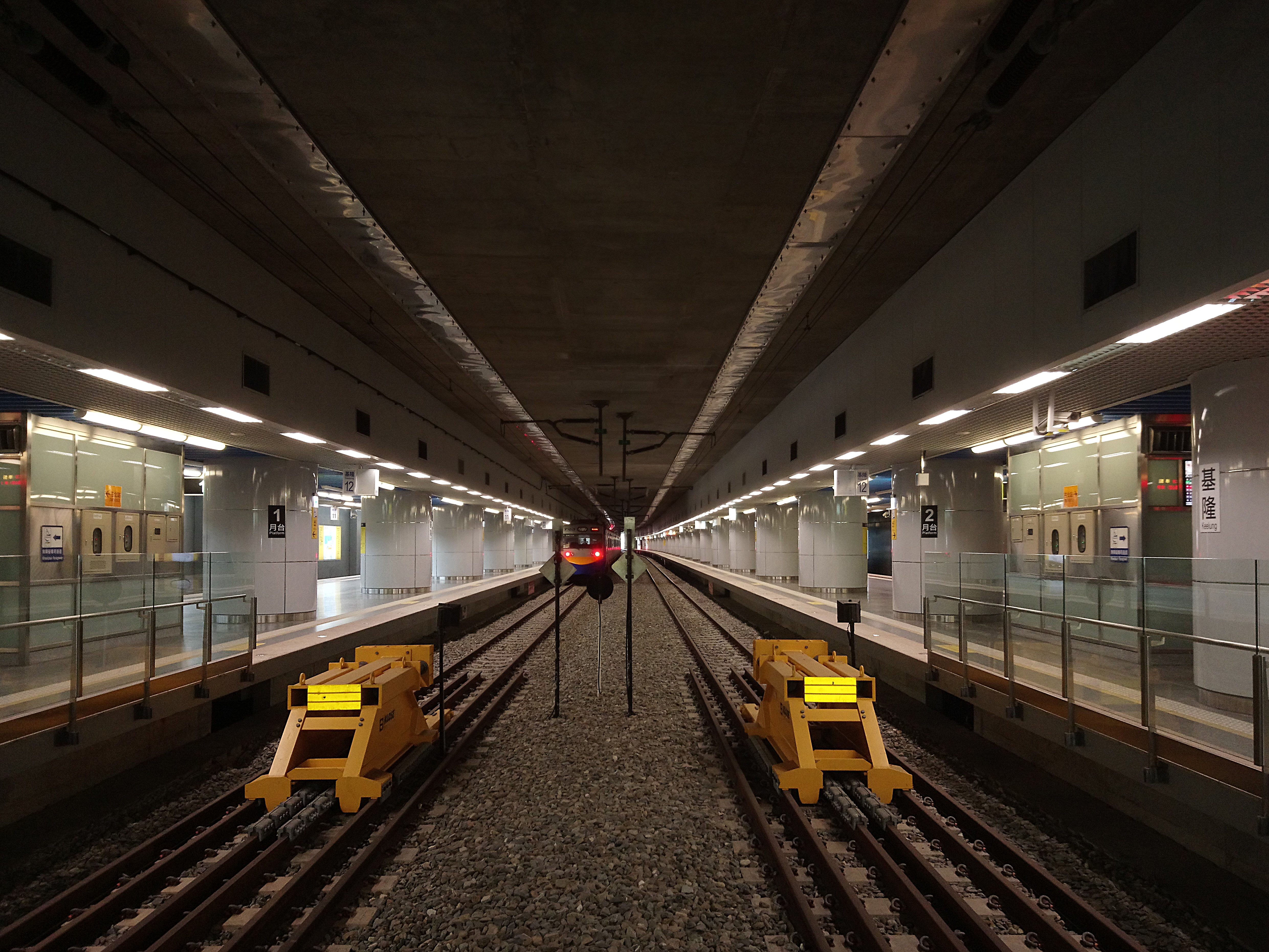 臺灣鐵路縱貫線起點路軌,臺灣省基隆市仁愛區文昌里